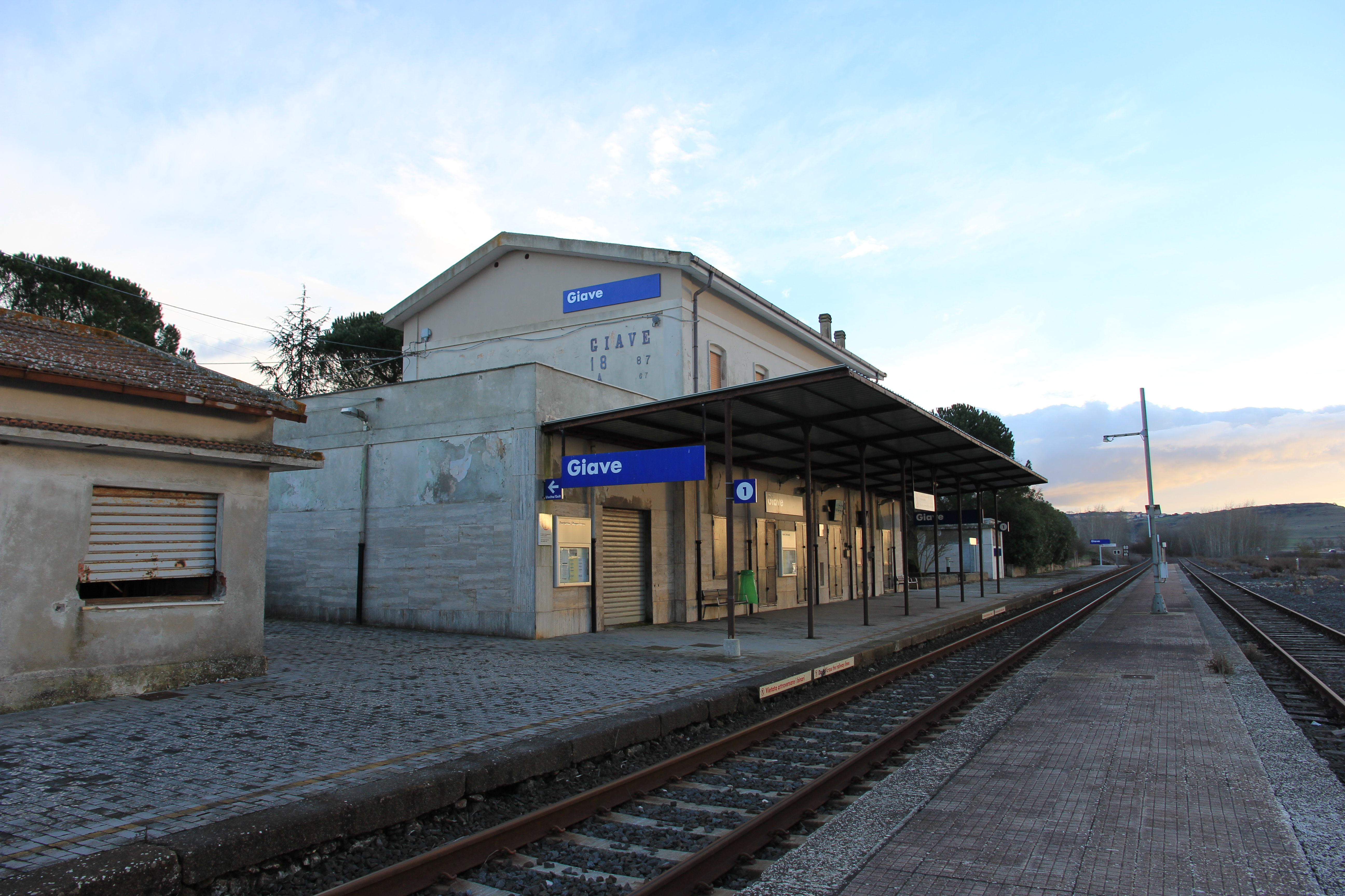 Giave - Stazione ferroviaria